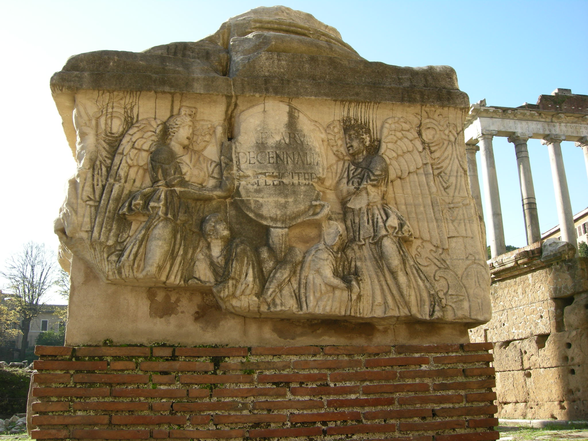 Base dei decennalia 02